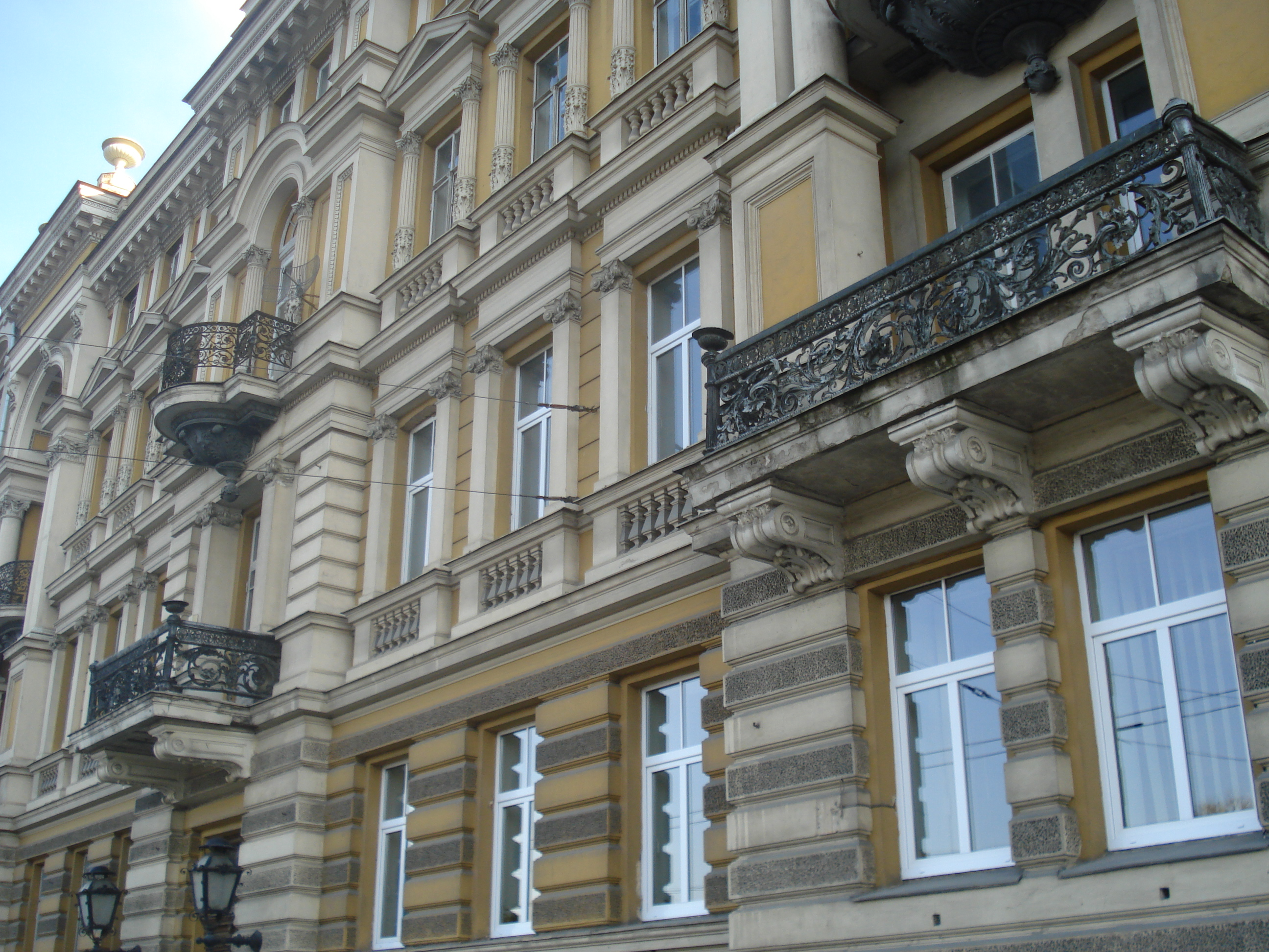 House of Ignacy Parczewski in Vilnius. Žygimantų 9. 1895. Architect Apolinaras Mikulskis (Apolinary Mikulski).